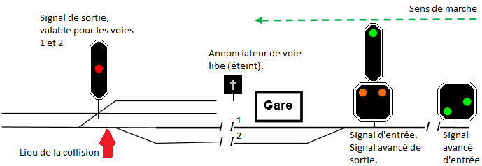 Accident de Granges-Marnand, Suisse, 2013 Arrivée du train R (S21) 12976.